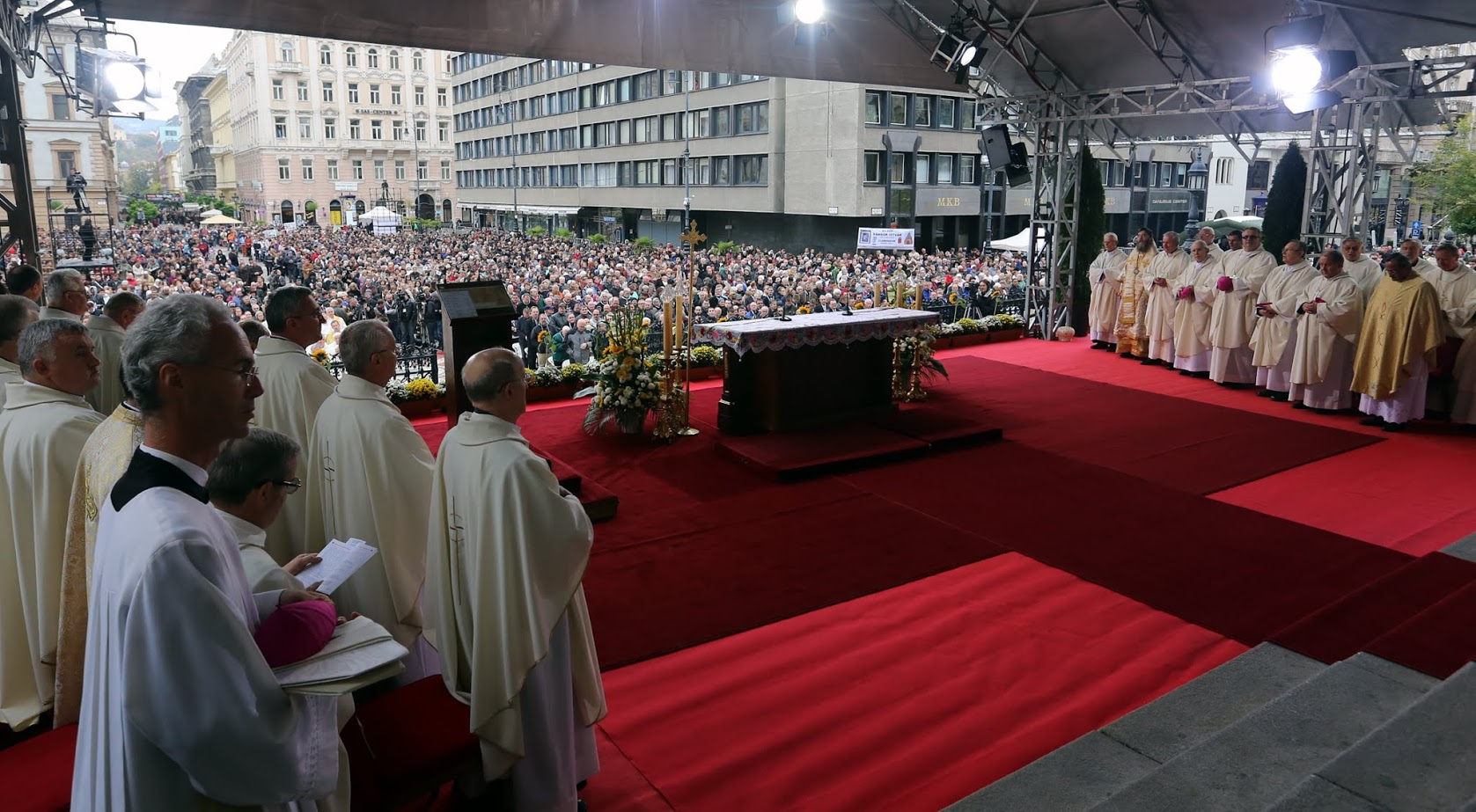 Sándor István boldoggá avatása a Szent István bazilika előtt Canonization of István Sándor in Budapest